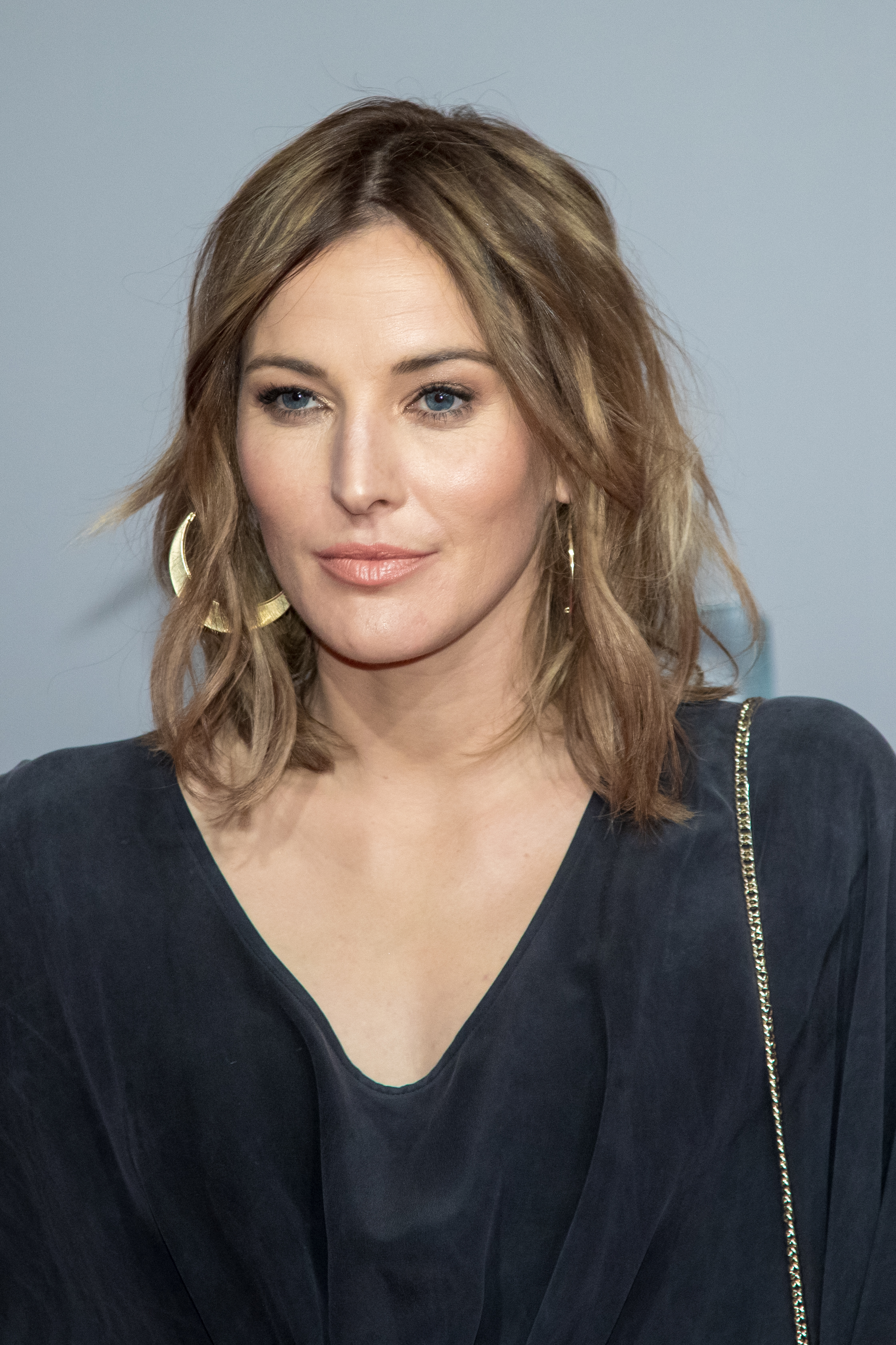 Jeannine Michaelsen beim Deutschen Fernsehpreis 2019 in der Düsseldorfer Rheinterrasse